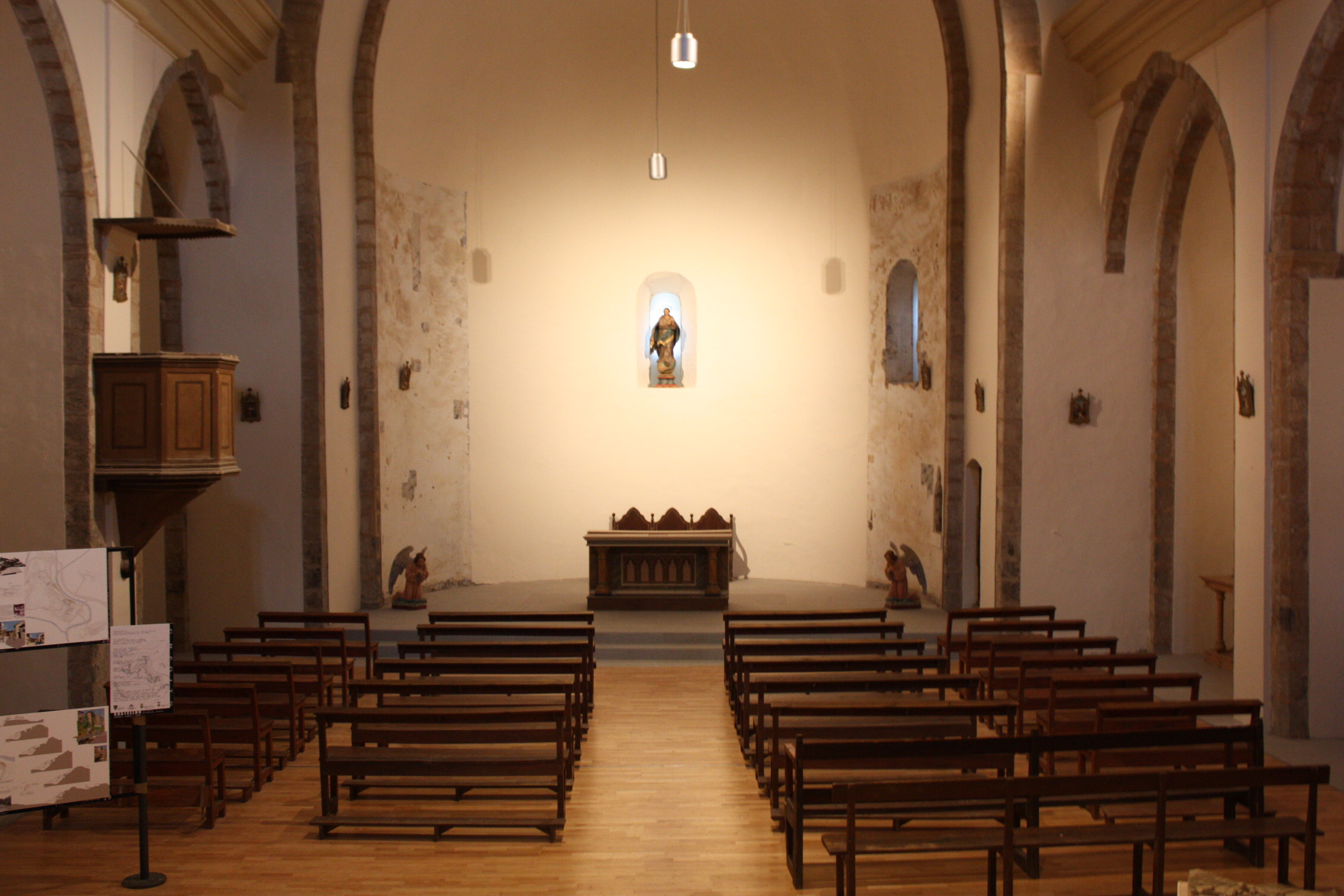 Interior de Santa Maria de Castellbò.